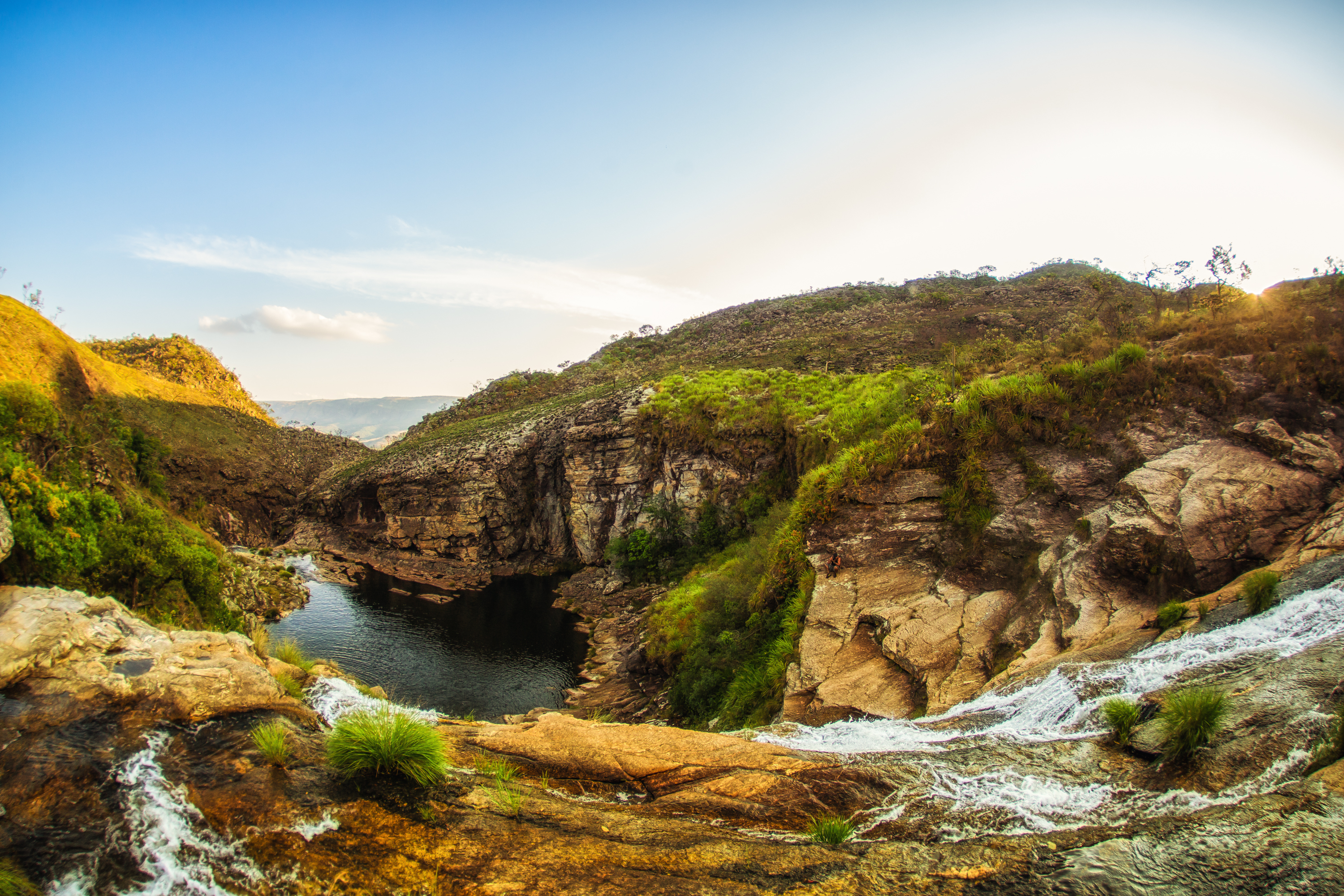 Vista do alto da cachoeira Casca Danta na Serra da Canastra.